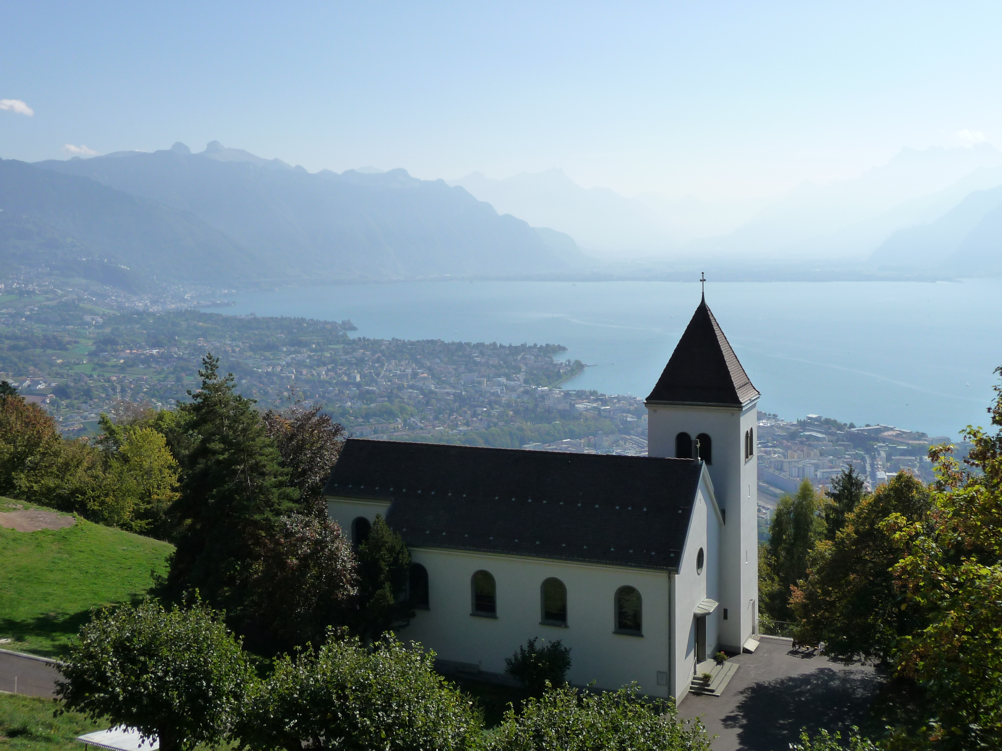 Kirche von Chardonne in der Schweiz. Im Hintergrund die Stadt Vevey.